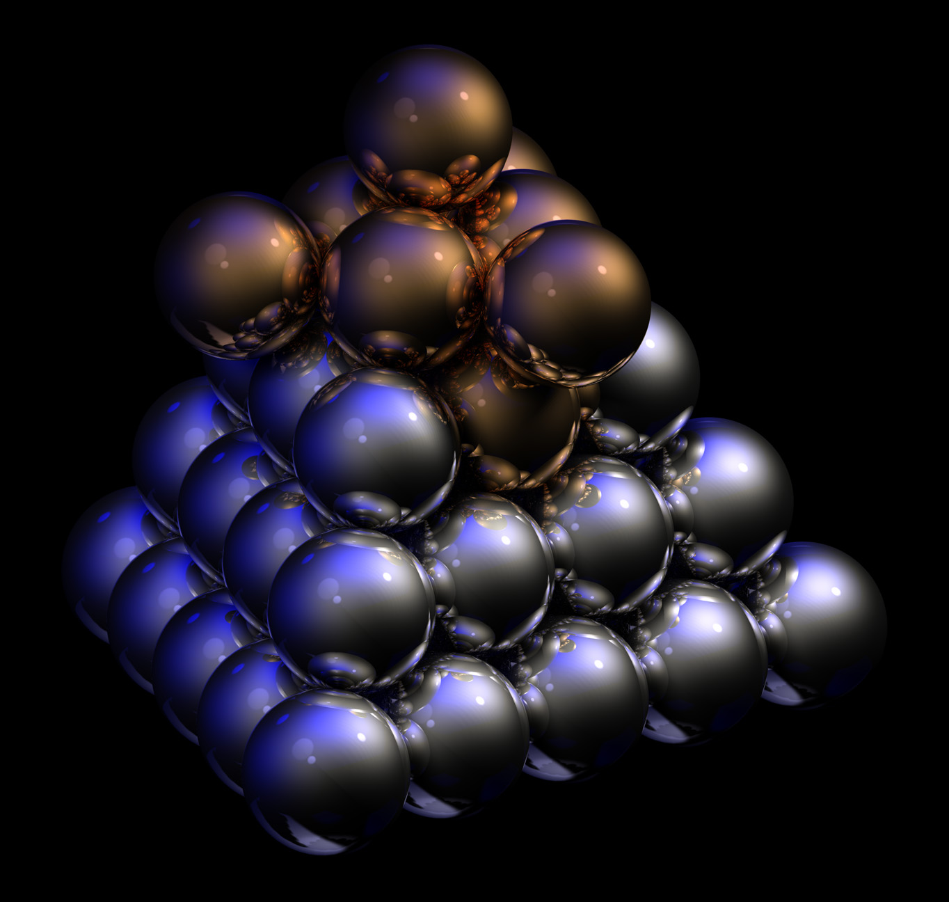 see below